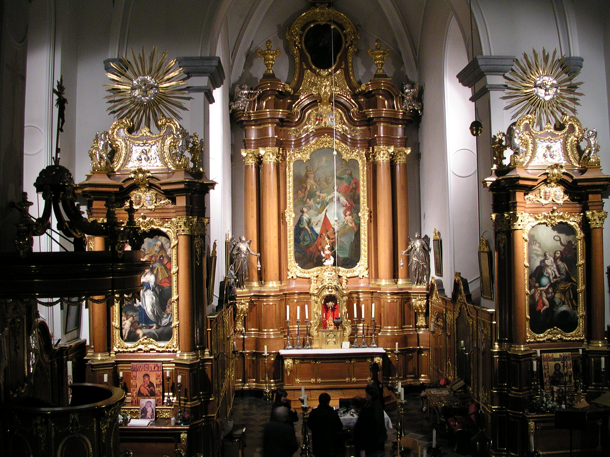 Innenraum der Theresienkirche in Aachen, 1739-1748 als Kirche des Karmelitessenklosters St. Theresia im Barockstil erbaut. Architekt: Laurenz Mefferdatis, Innenarchitekt: Johann Joseph Couven